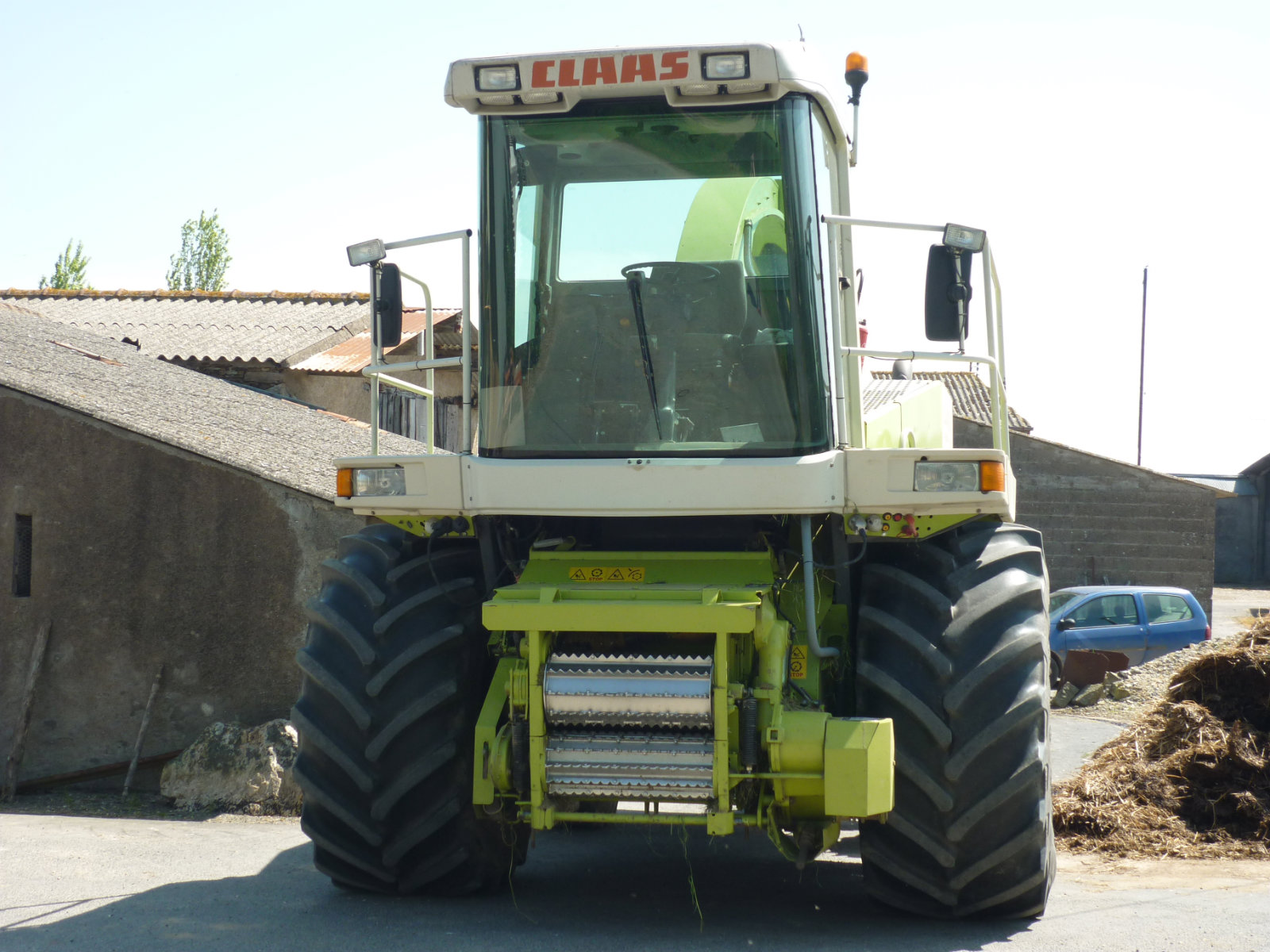 Claas Jaguar 840 de face, sans bec